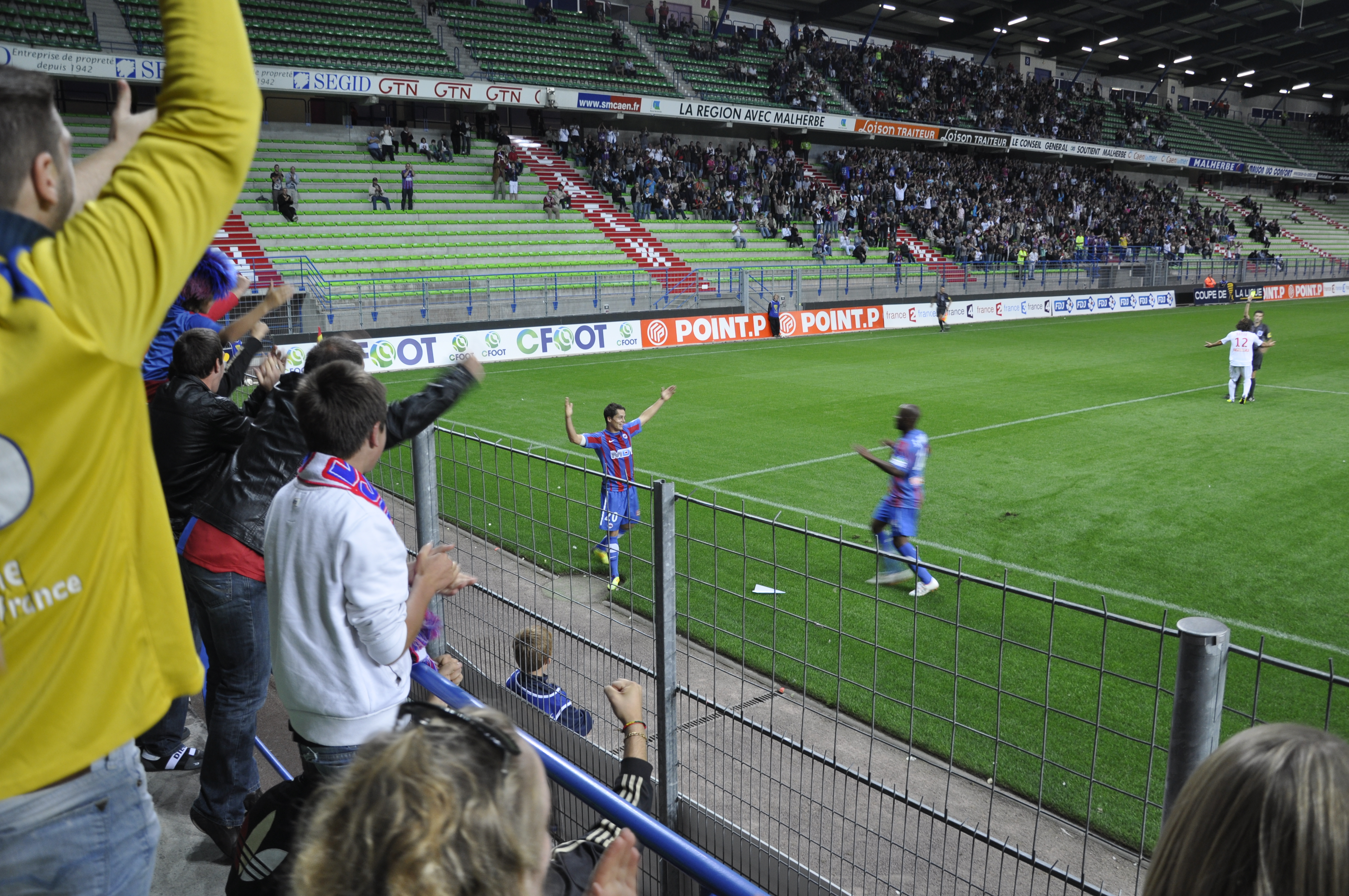 Romain Hamouma célèbre son but en coupe de la Ligue face à Brest